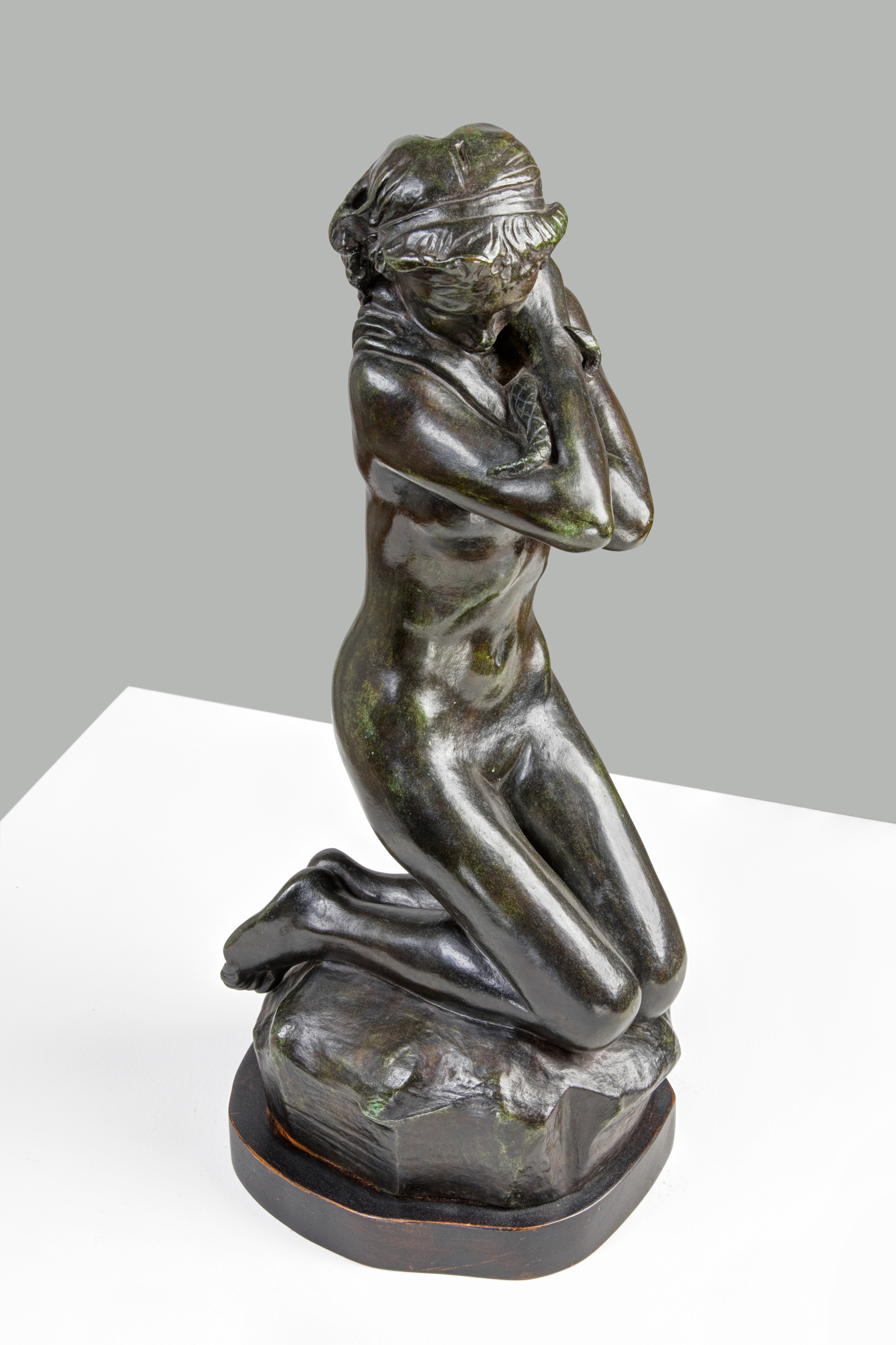 La era de Rodin Colección Museo Soumaya